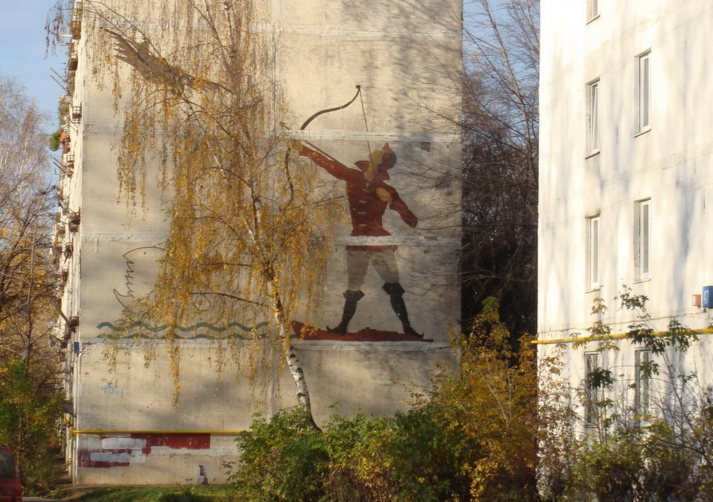 Ангарская улица до реконструкции.